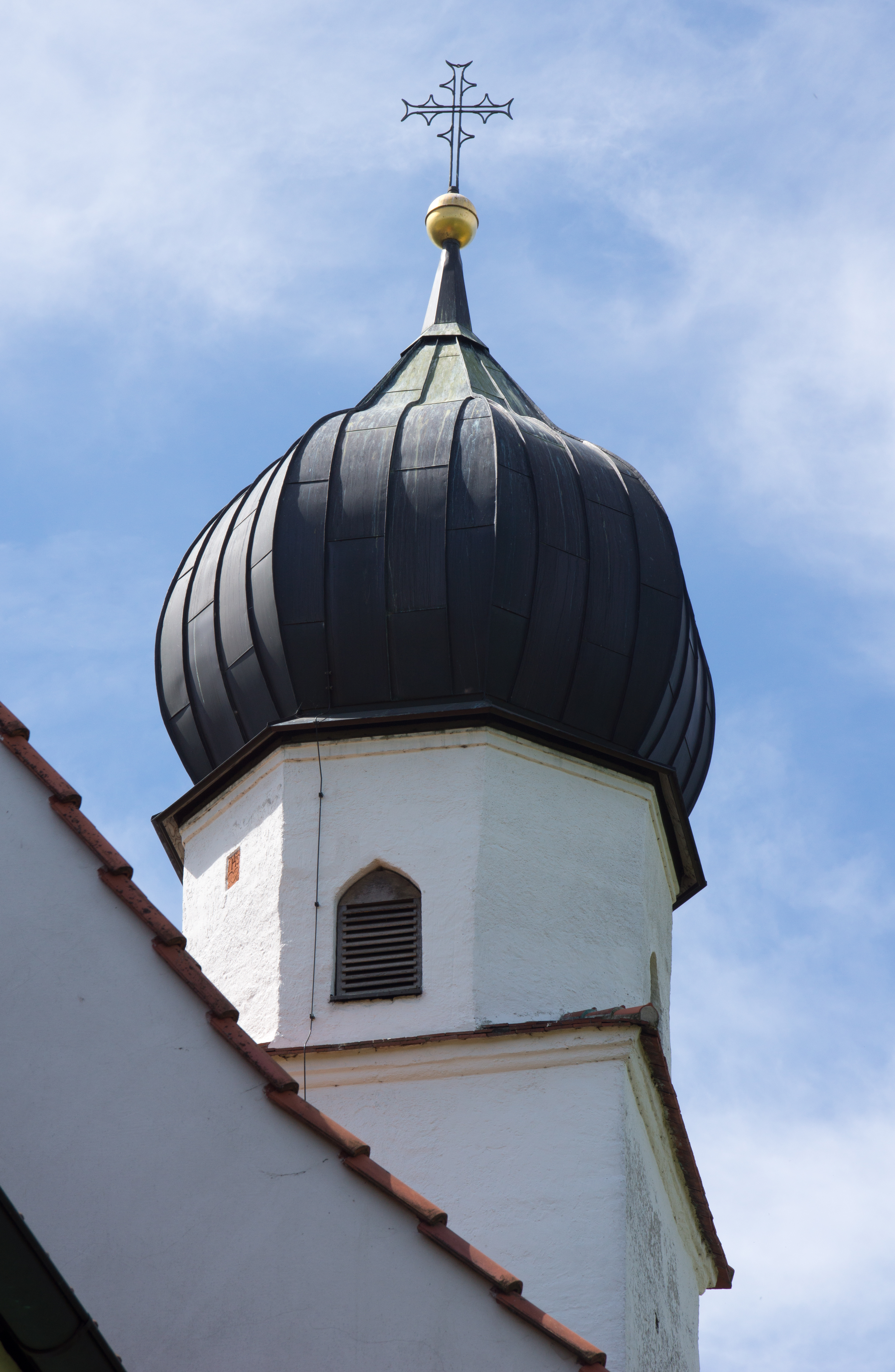 Kapelle St. Wolfgang bei Essenbach